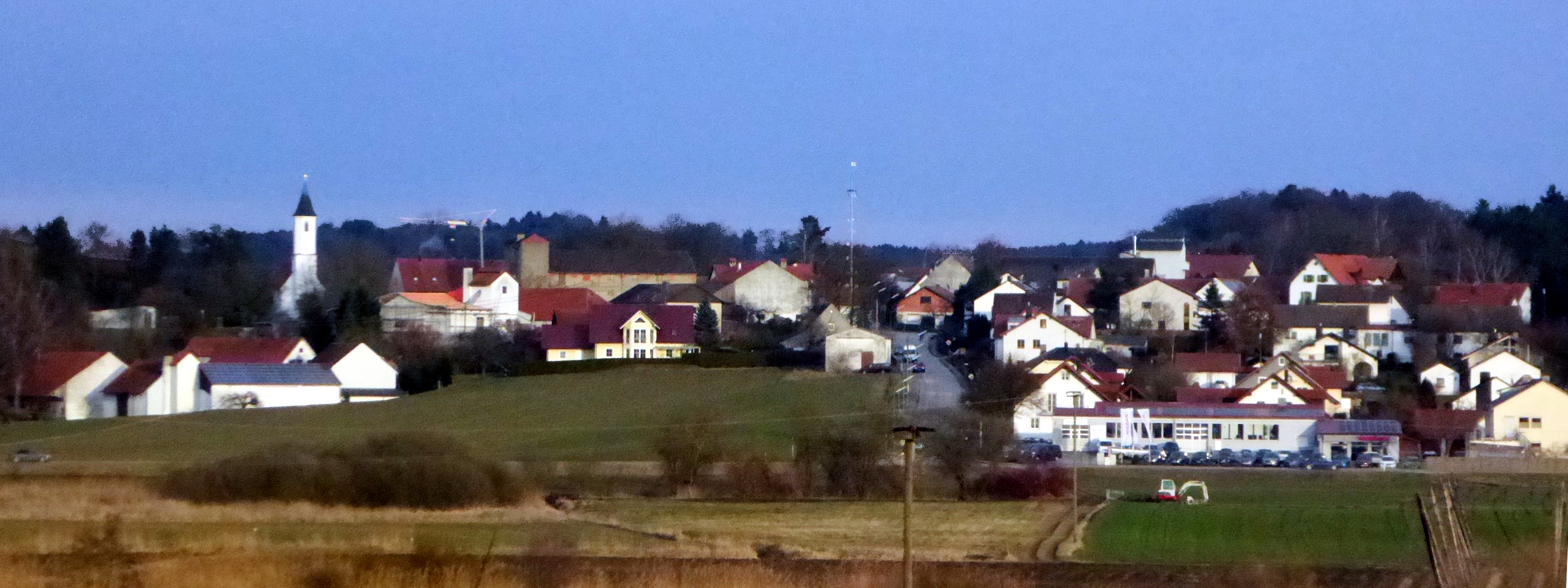 Wolnzach, Blick von Westen auf den Ortsteil Burgstall.